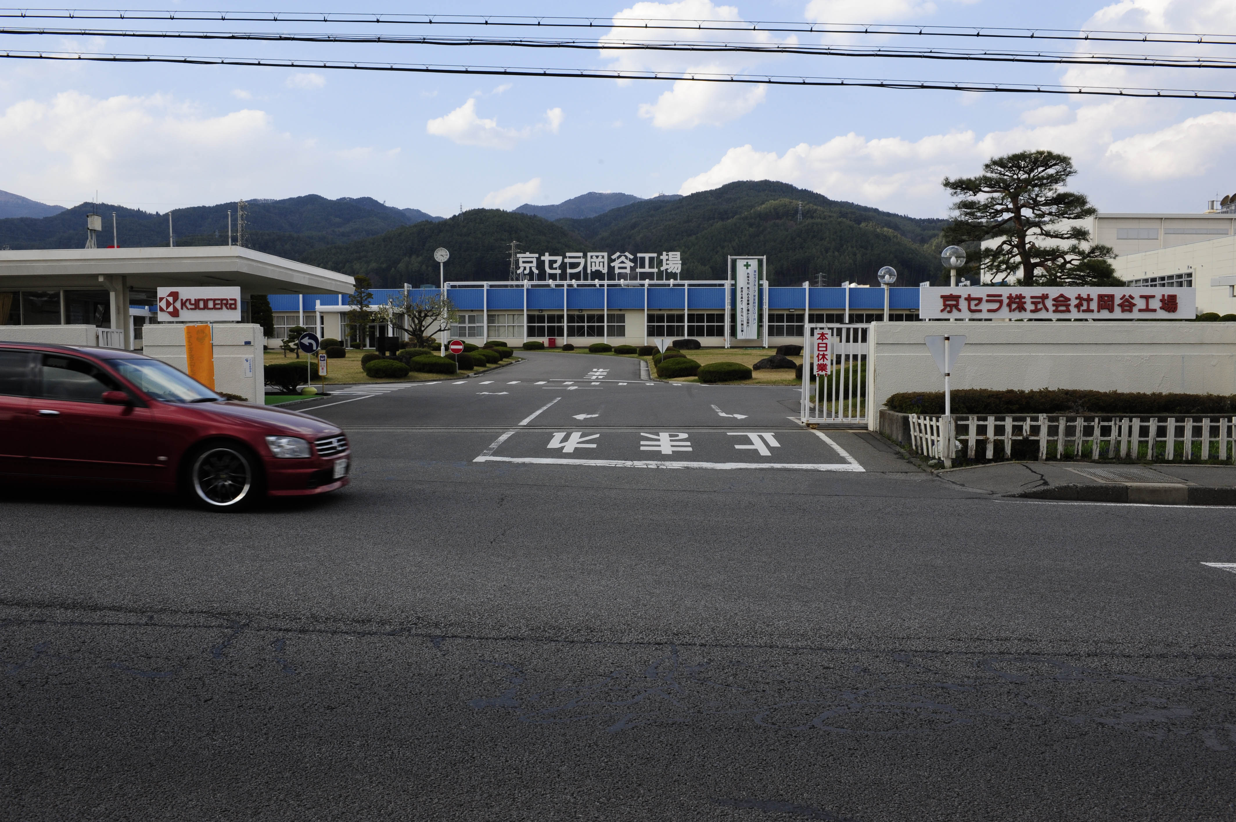 京セラ岡谷工場